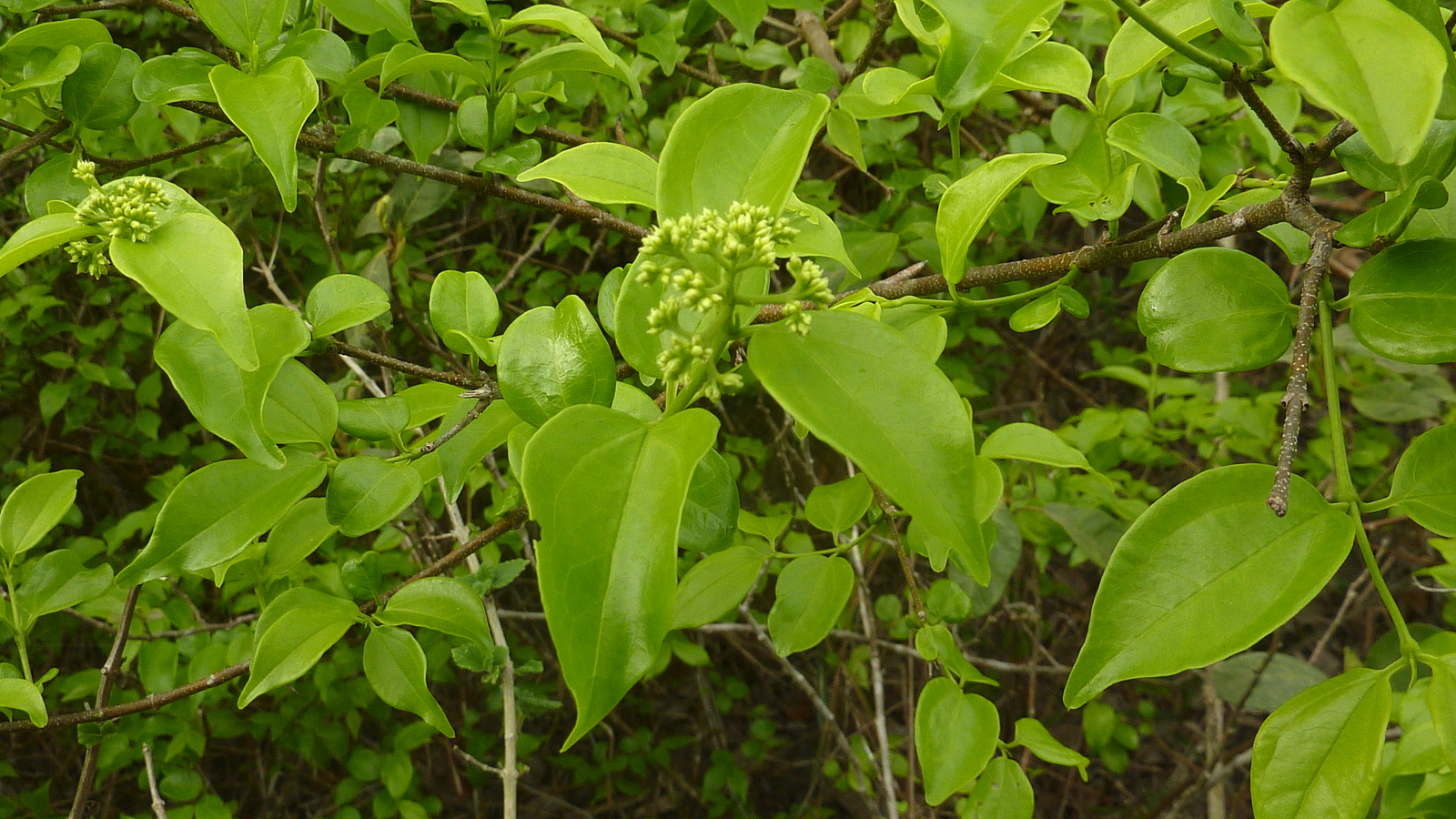 Strychnos brasiliensis (Spreng.) Mart.